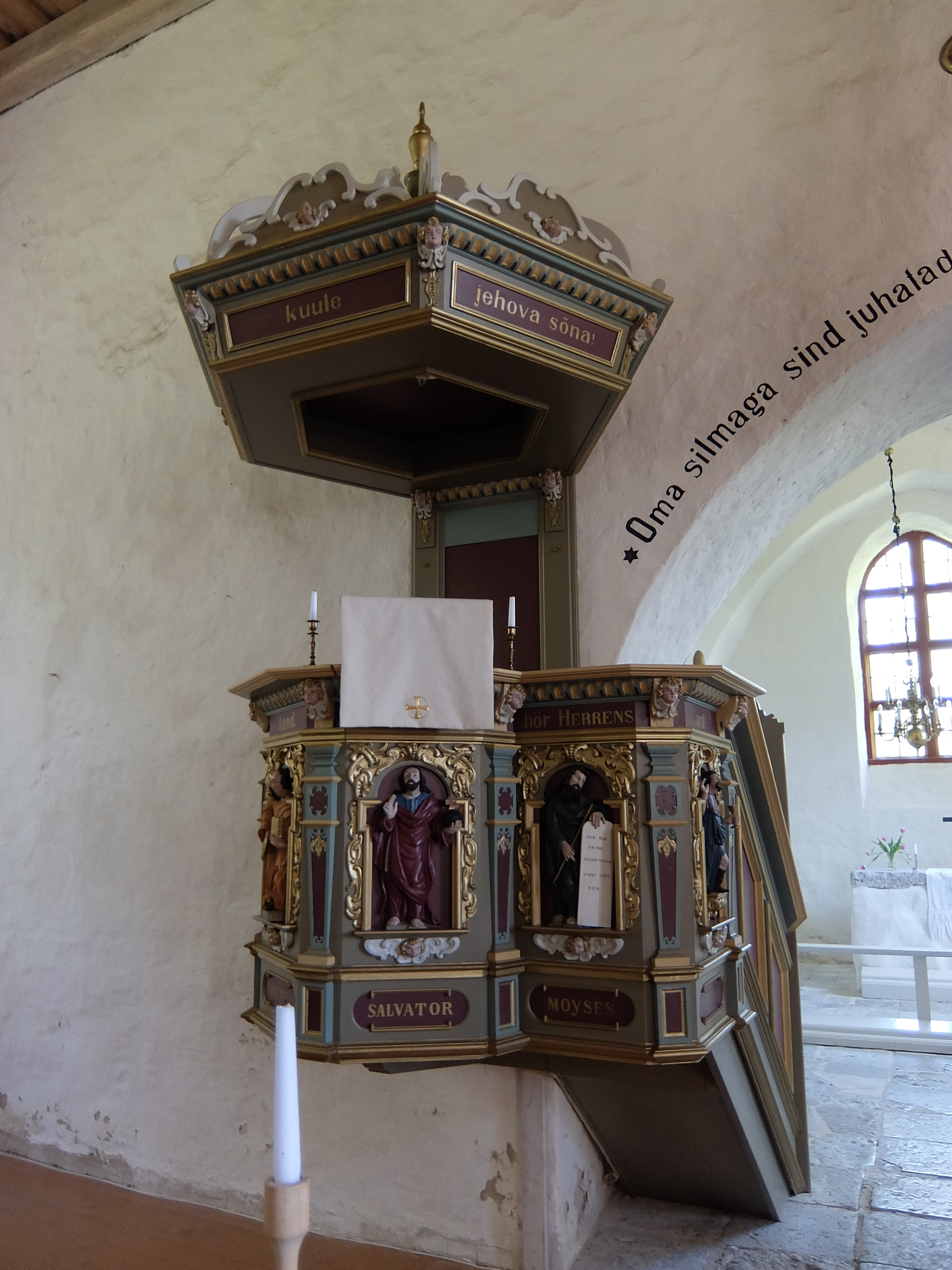 Vormsi kiriku kantsel